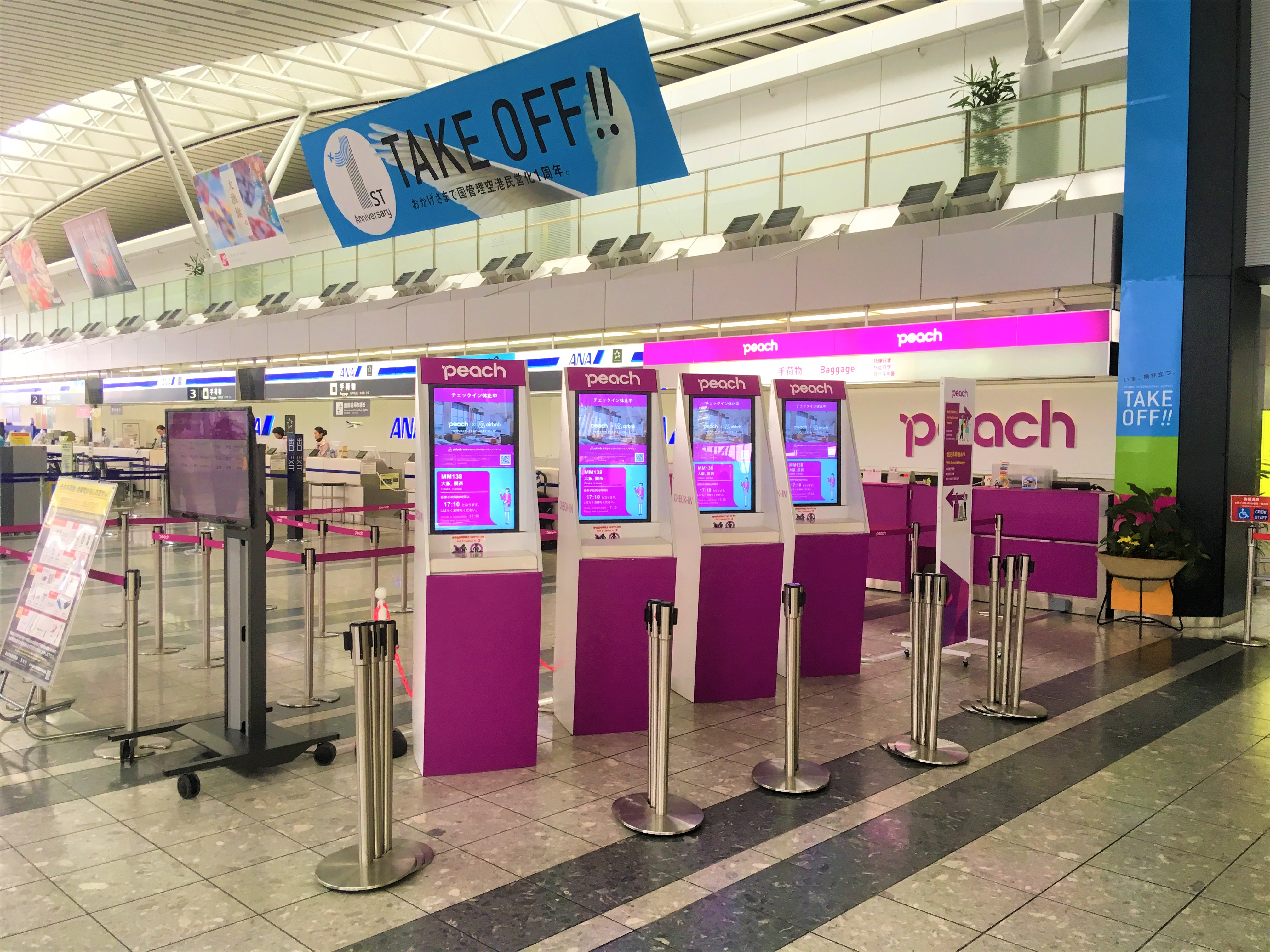 仙台空港 Peachチェックインカウンター（2018年5月）